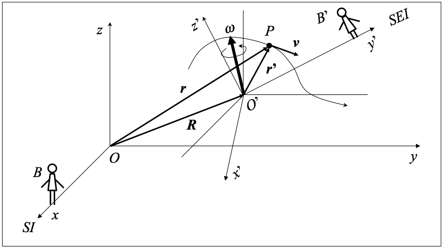 Irudi eskematikoa